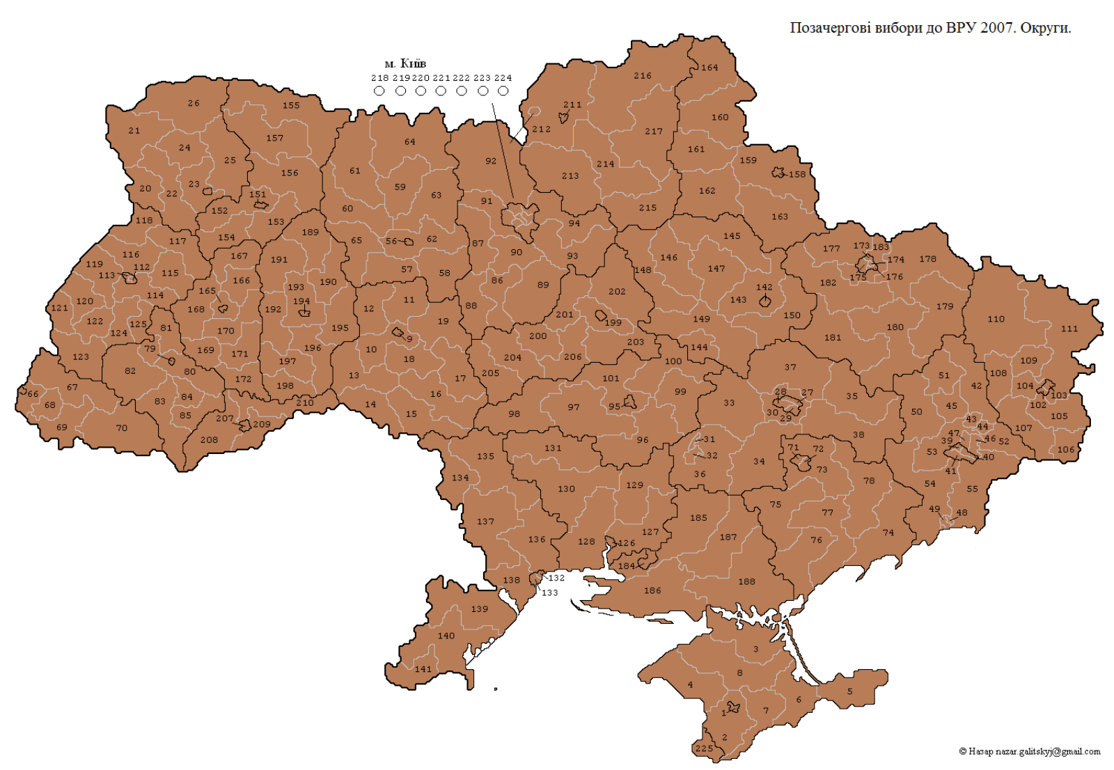 Україна. Дострокові Парламентські вибори 2007. Виборчі округи.